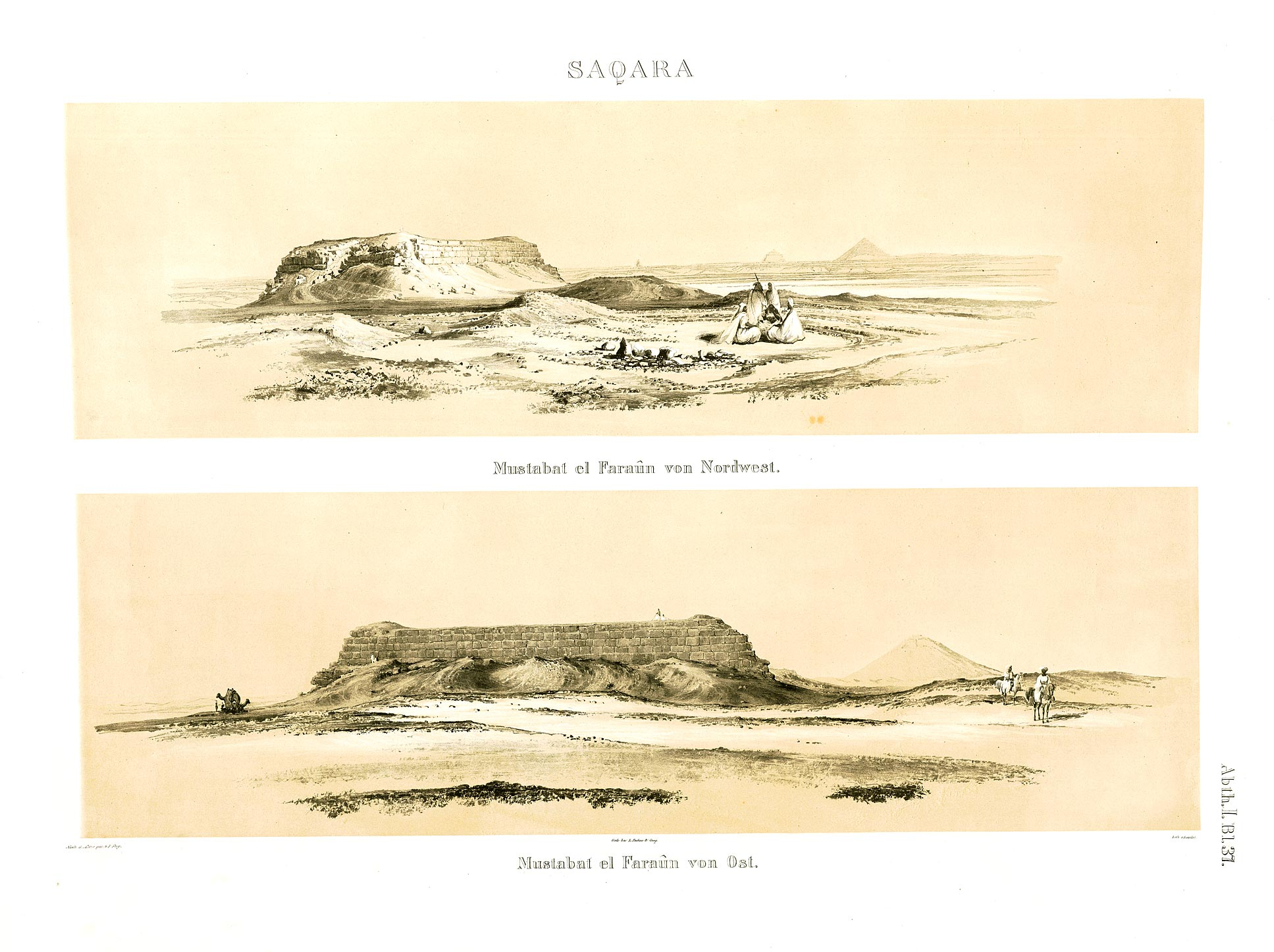 Denkmaeler aus Aegypten und Aethiopien nach den Zeichnungen der von Seiner Majestät dem Koenige von Preussen, Friedrich Wilhelm IV., nach diesen Ländern gesendeten, und in den Jahren 1842–1845 ausgeführten wissenschaftlichen Expedition auf Befehl Seiner Majestät